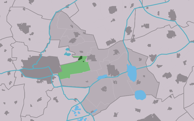 Kaartsje fan himrik fan Tytsjerk